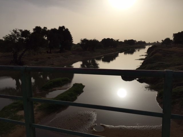 Coucher du soleil sur la Komadougou, rivière séparant le nord du Nigéria au Niger, vers mars 2015